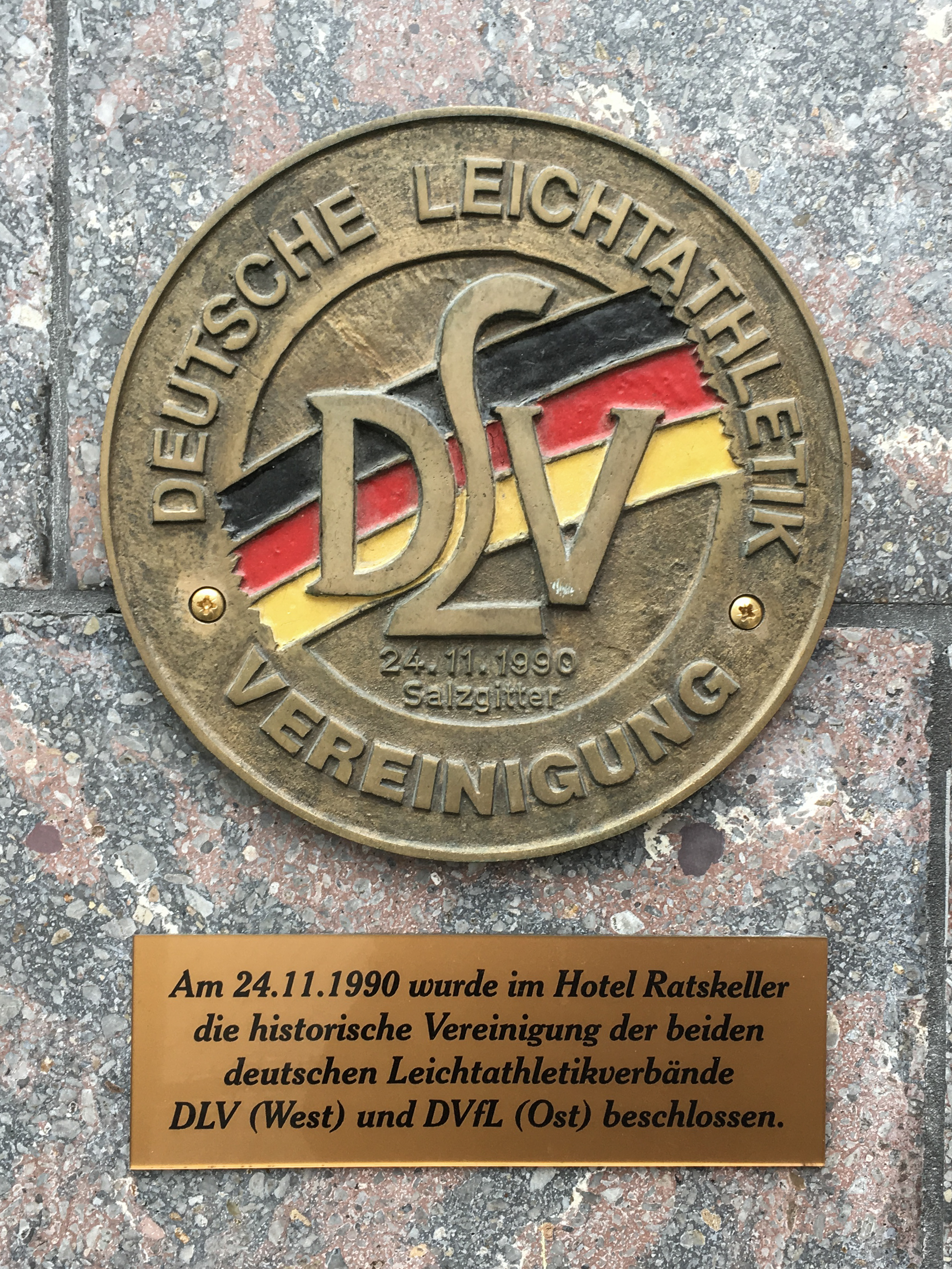 Gedenktafel zur Vereinigung der Leichtathletikverbände DLV (West) und DVfL (Ost) vom 24. November 1990 am Ratskeller in Salzgitter-Bad